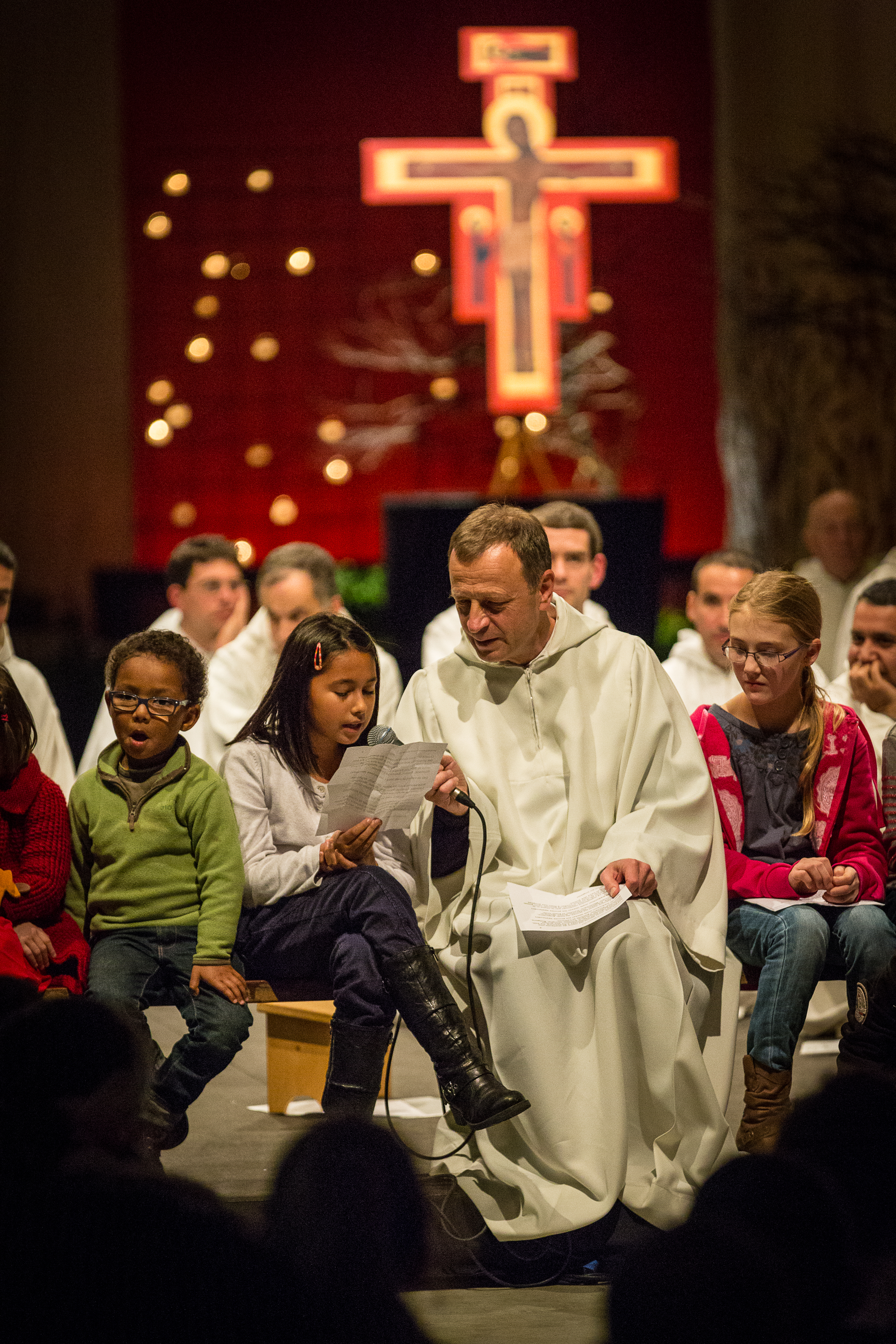 36e rencontres internationales de Taizé Strasbourg 28 décembre 2013